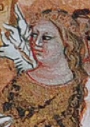 Jitka